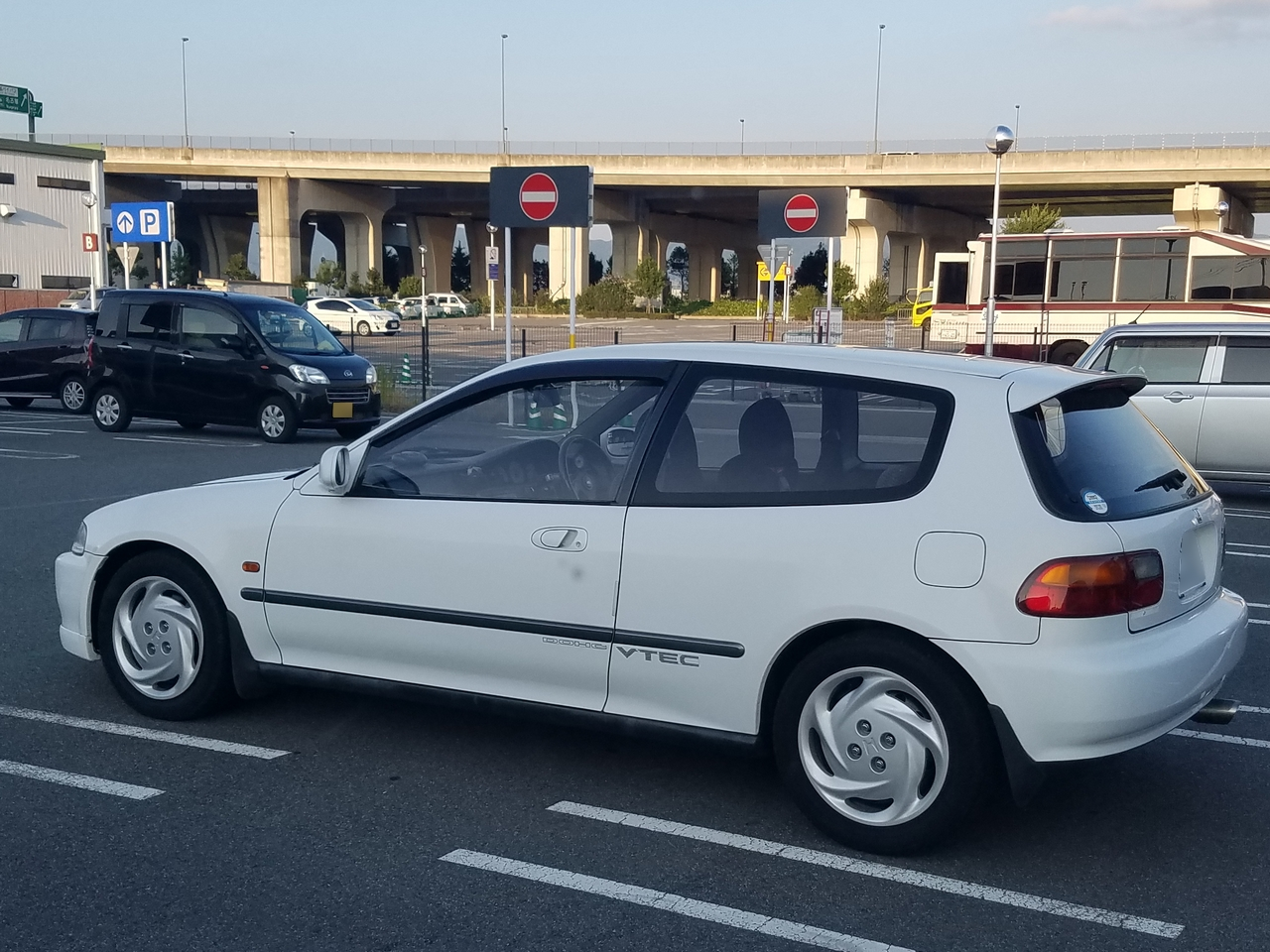 シビック SiR